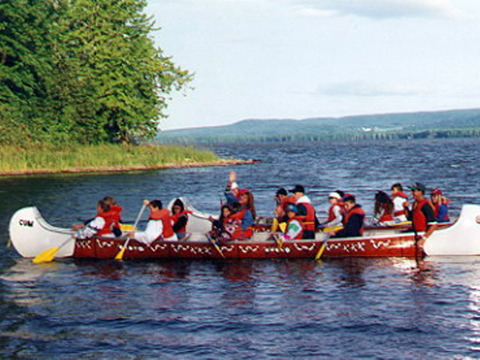 Jeunes en Rabaska au Cap St-Jacques